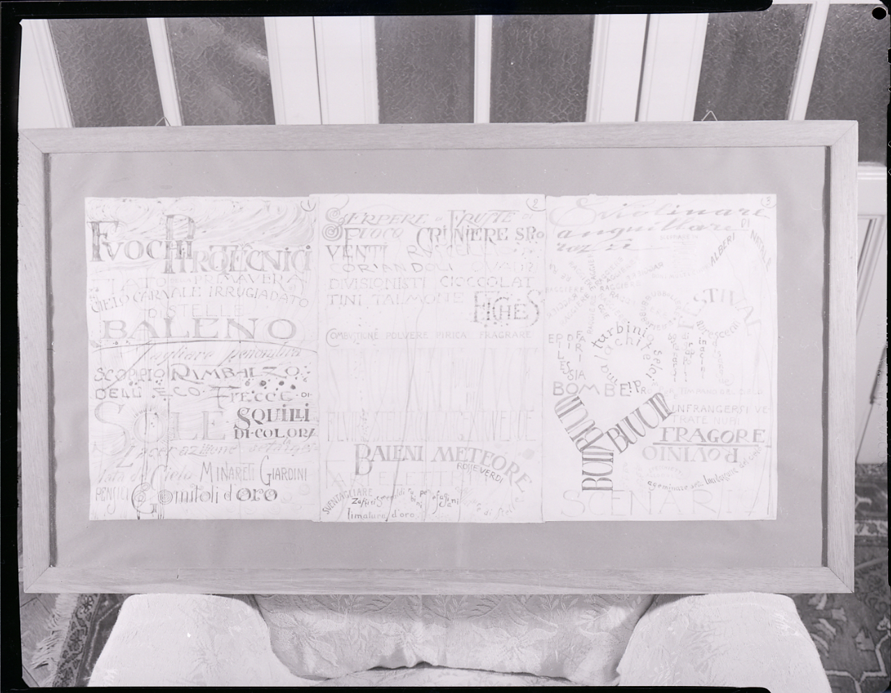 Servizio fotografico : Milano, 1963 / Paolo Monti. - Buste: 2, Fototipi: 2 : Negativo b/n, gelatina bromuro d'argento/ pellicola ; 10x12. - ((Serie costituita da 2 buste sciolte di negativi identificati con una doppia numerazione (42500 e 42501): 24060, 24061. - La doppia numerazione potrebbe corrispondere ai lavori realizzati durante il periodo di attività del laboratorio e studio fotografico "Foto Studio 22", società che risulta essere stata aperta il 10/04/1961, con partecipazione, nel ruolo di gerente, di Vincenzo Carrese. - Fonte: Rubrica di Paolo Monti: Archivio fino 1-4-1961/ 31-3-1963 (1961-1963), presso Archivio Paolo Monti